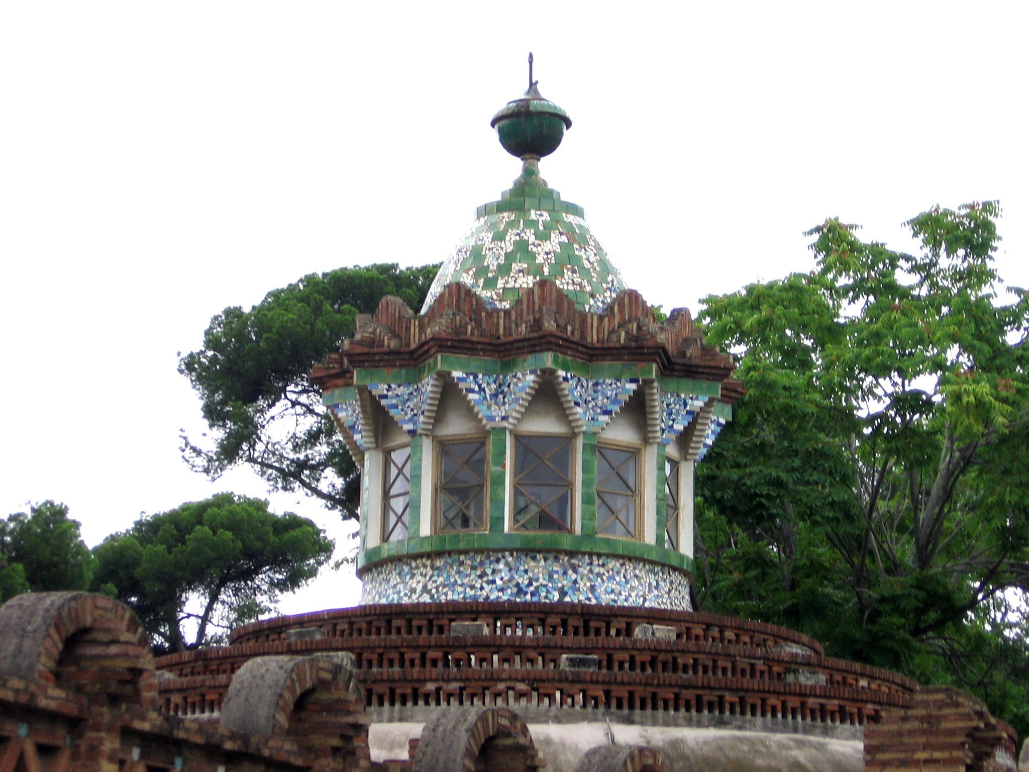 Pabellones Güell, de Antoni Gaudí